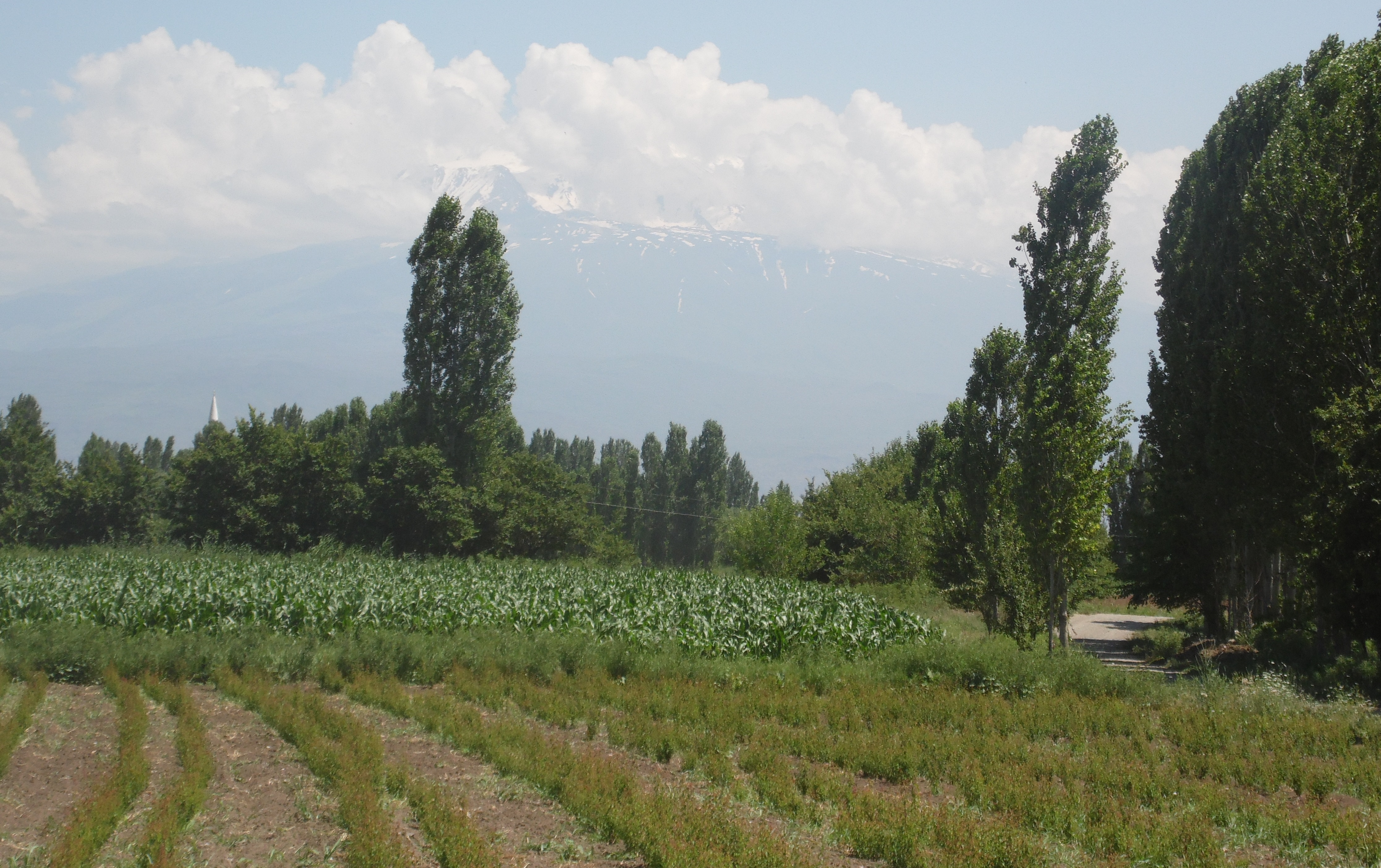 kayısı fidanı mısır ve ağrı dağı